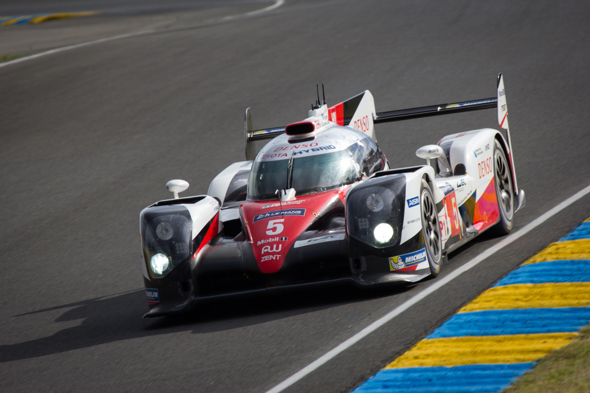 Drivers: Anthony Davidson, Sébastien Buemi, Kazuki Nakajima